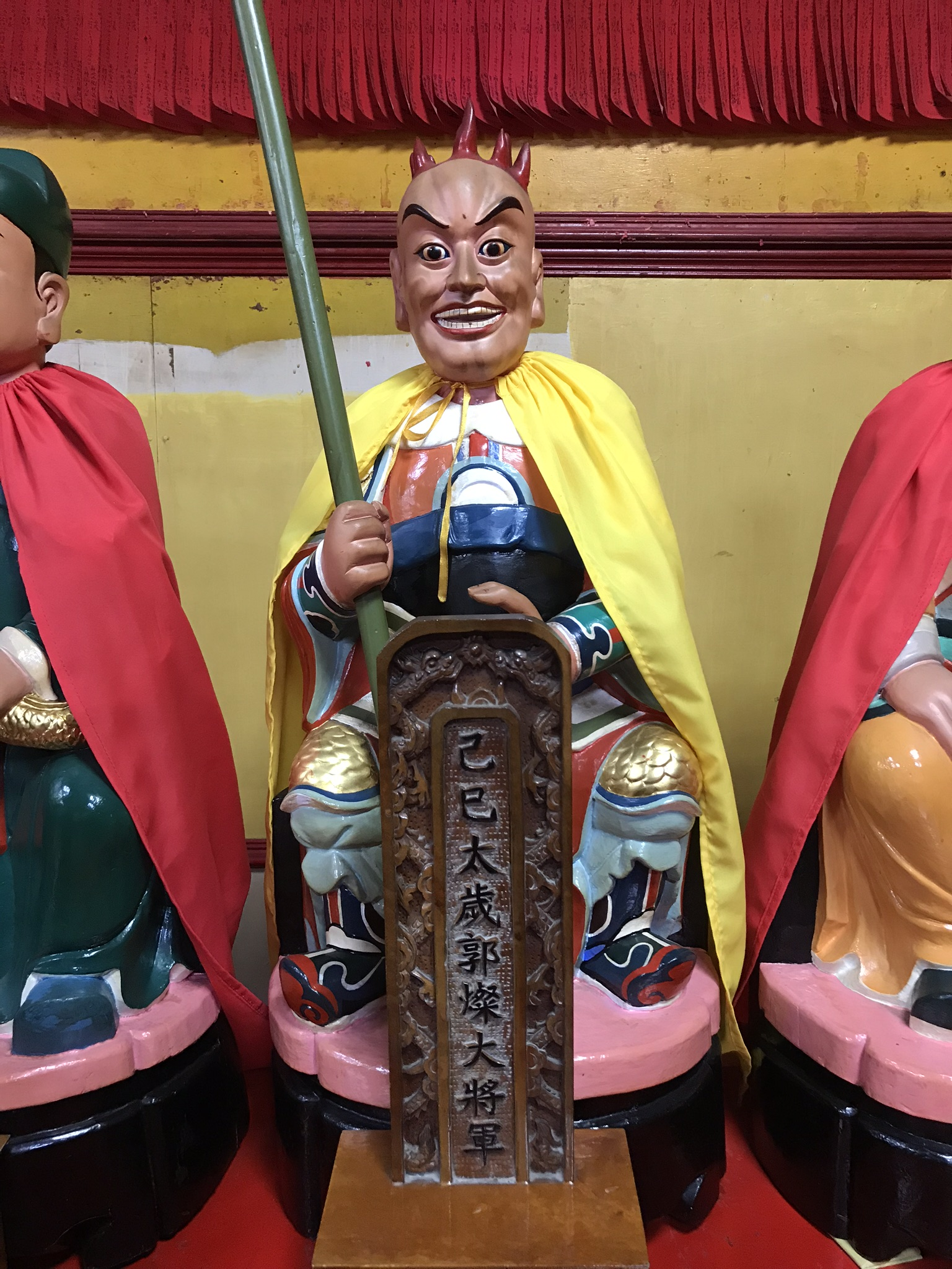 己巳太歲郭燦大將軍神像